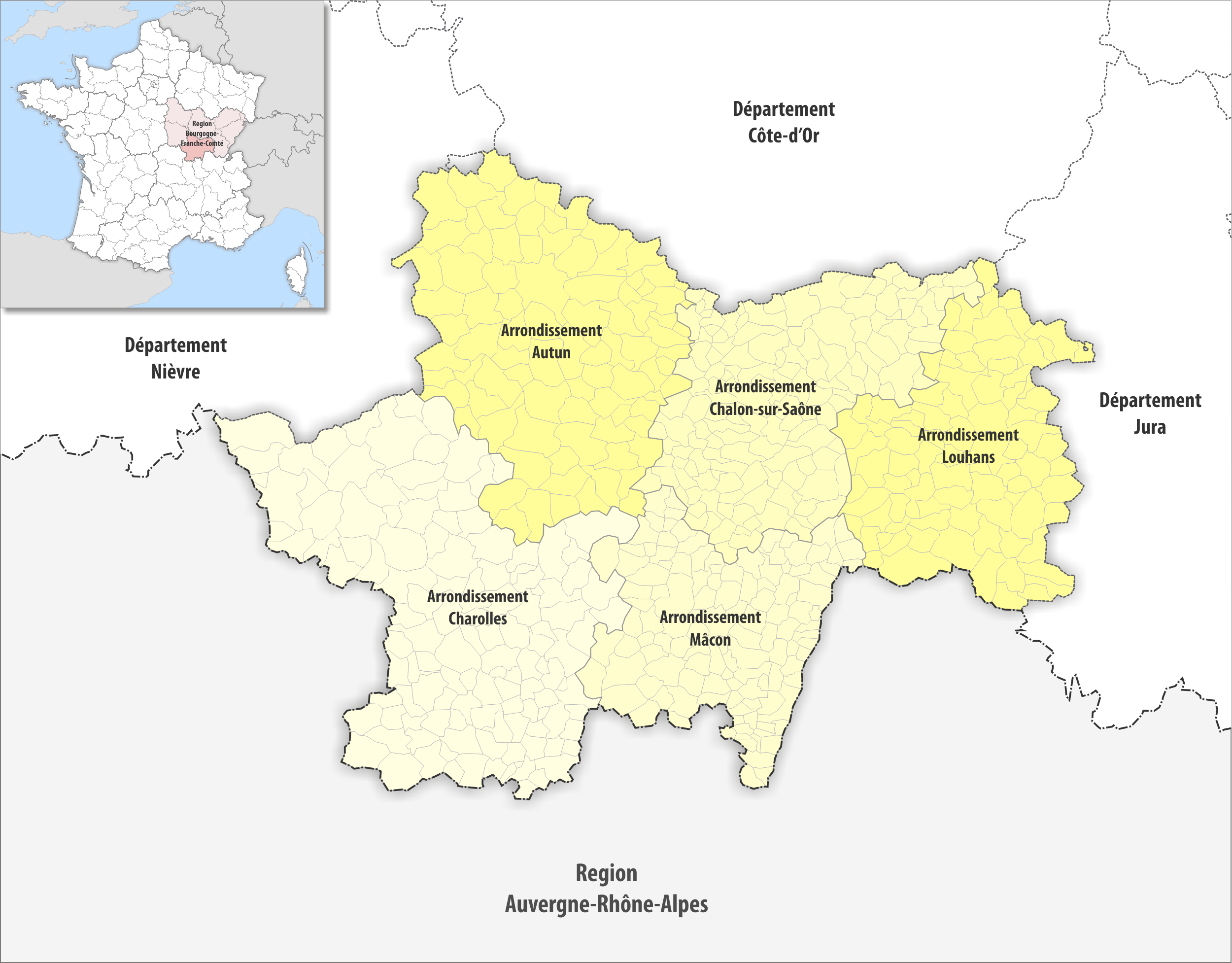 Gemeinden und Arrondissemente im Departement Saône-et-Loire